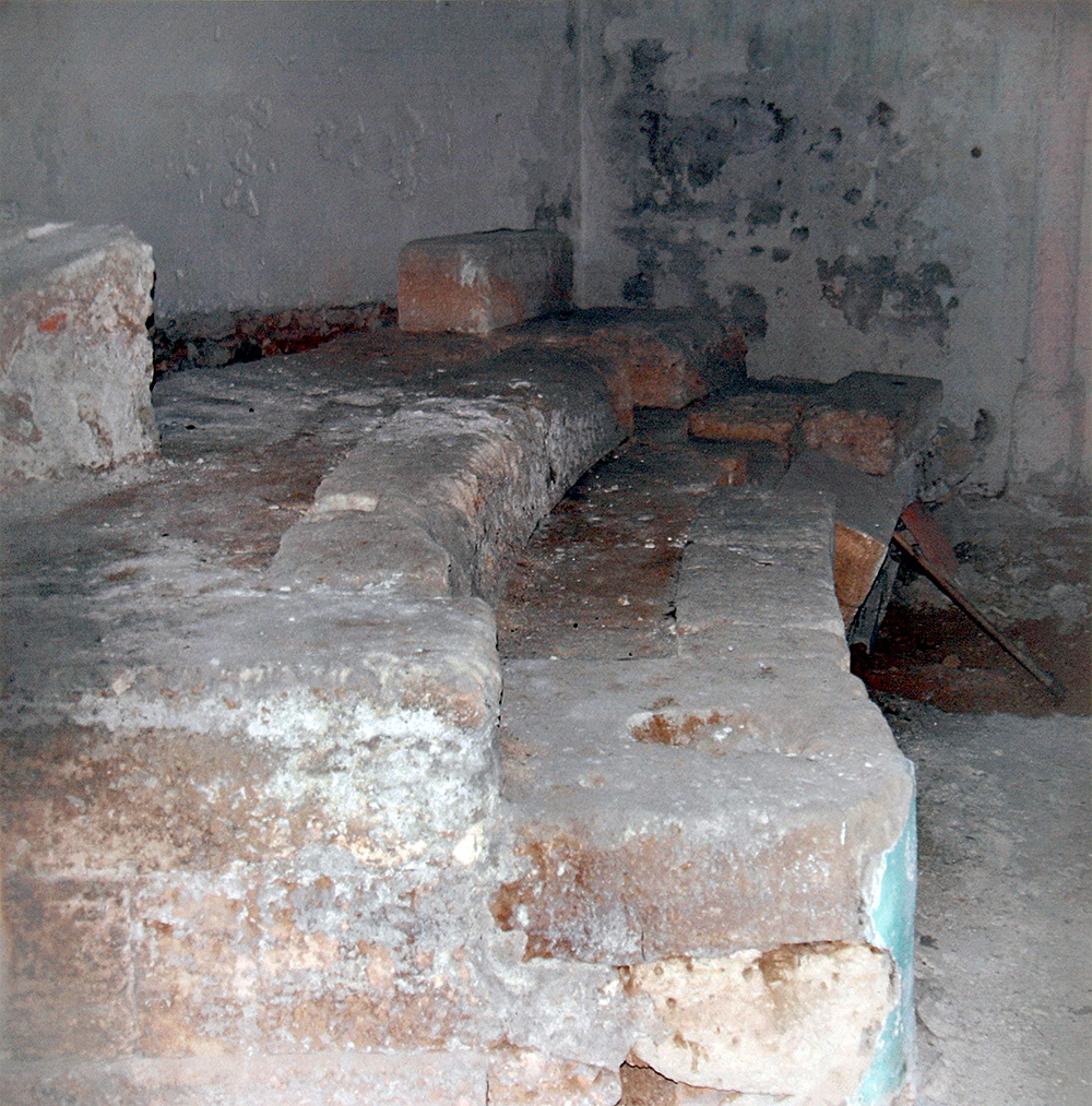 Reggio Calabria: Rudere dell'antico Odeion in via XXIV maggio